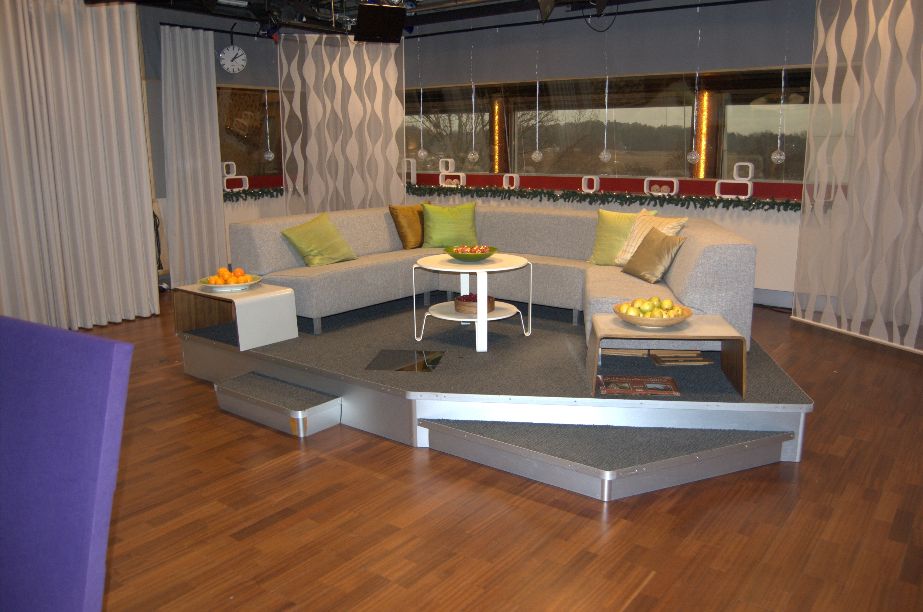 Rapports morgonsoffa, som finns i Sveriges Televisions lokaler i Stockholm.